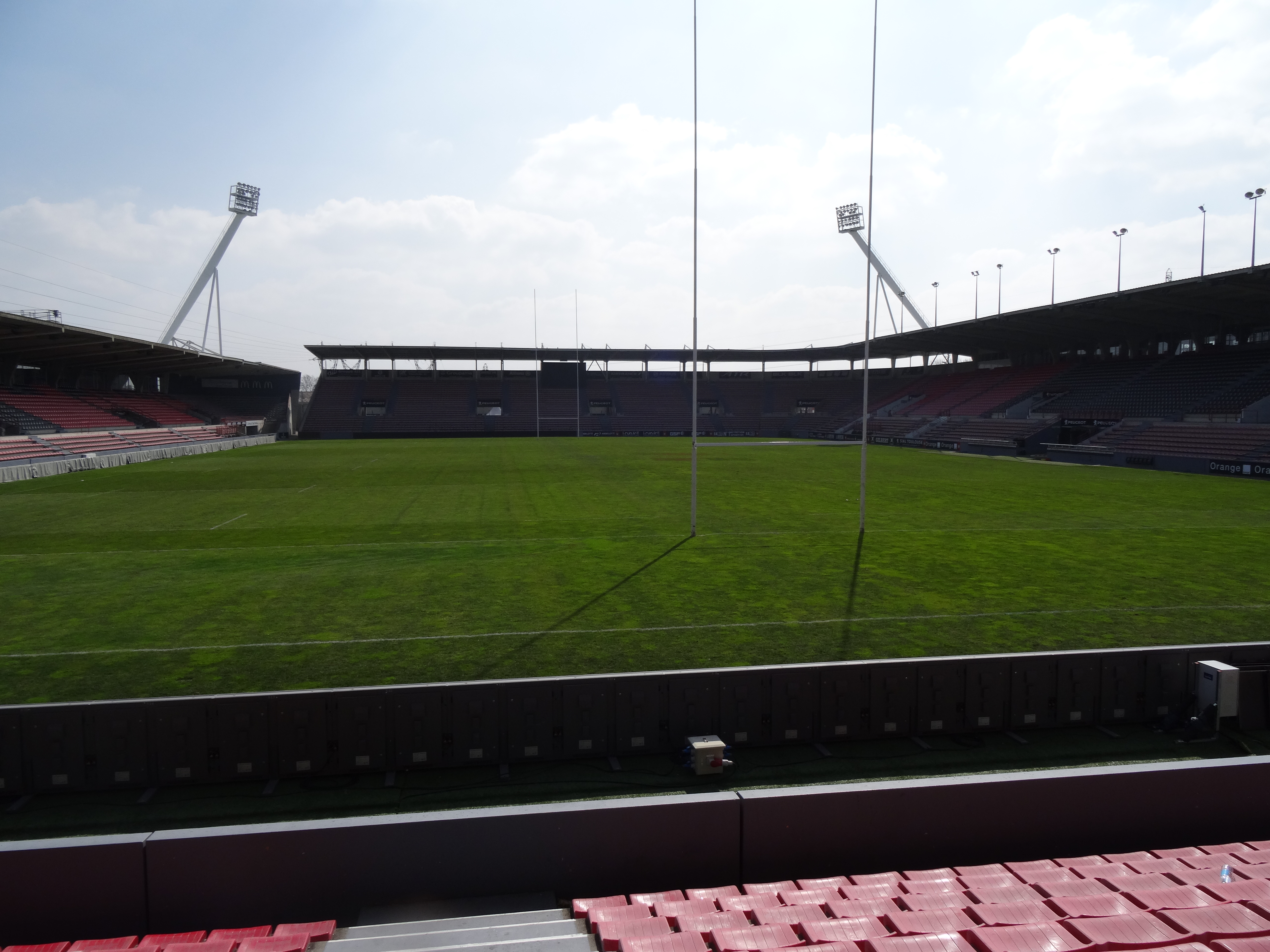 Stade Ernest-Wallon